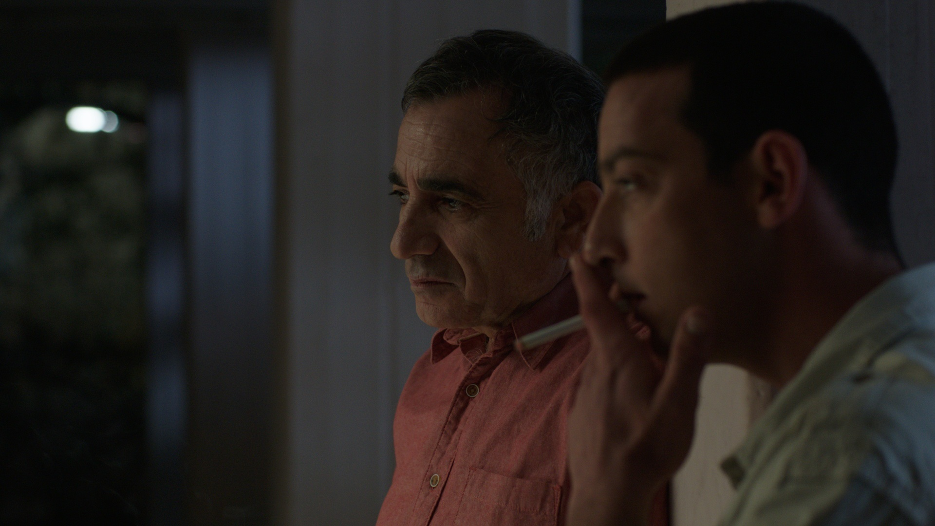 משה איבגי בסרט הנוער בבימויו של תום שובל